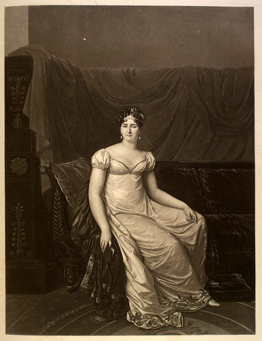 Louise Adélaïde Starot de Saint-Germain (1769-1850), dame du palais de l'impératrice Joséphine, puis de l'impératrice Marie-Louise, épouse du comte Jean-Pierre Bachasson de Montalivet